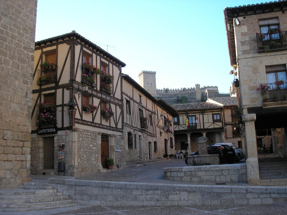 taken by Valdoria